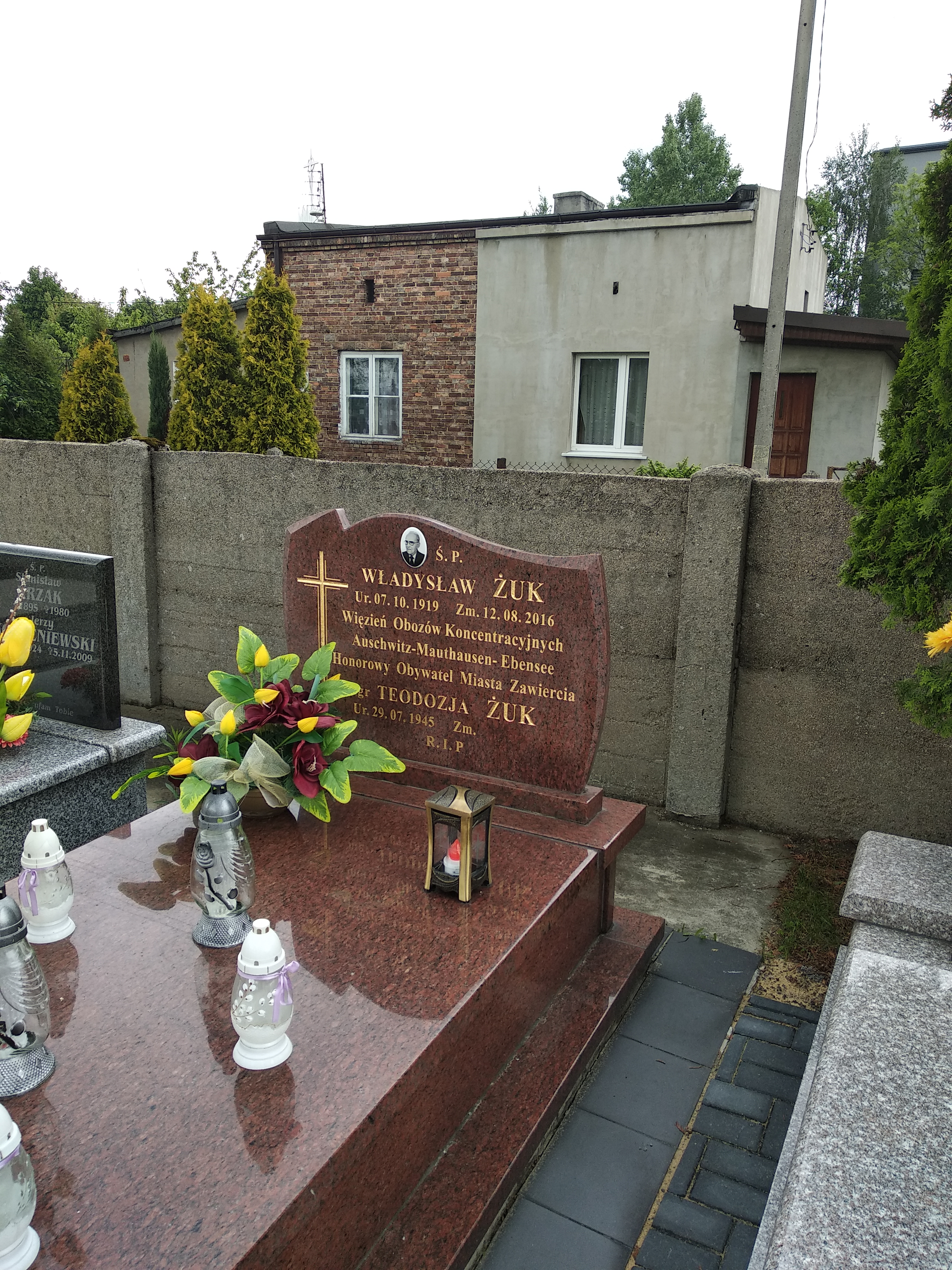 Nagrobek Władysława Żuka, honorowego obywatela Zawiercia.